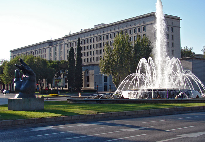 Plaza de San Juan de la Cruz con escultura de Botero y Nuevos Ministerios al fondo